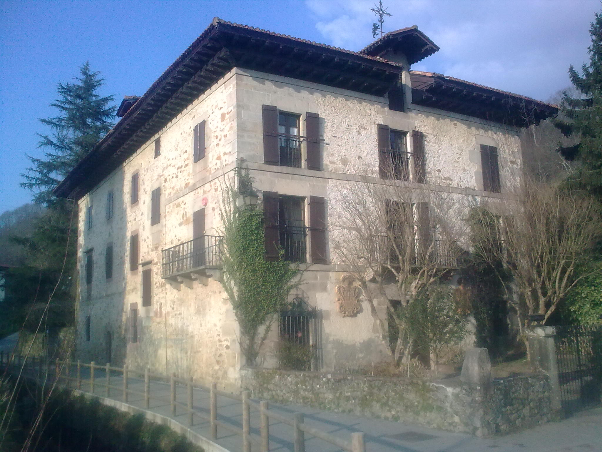 Itzea etxea (Bera, Nafarroa)